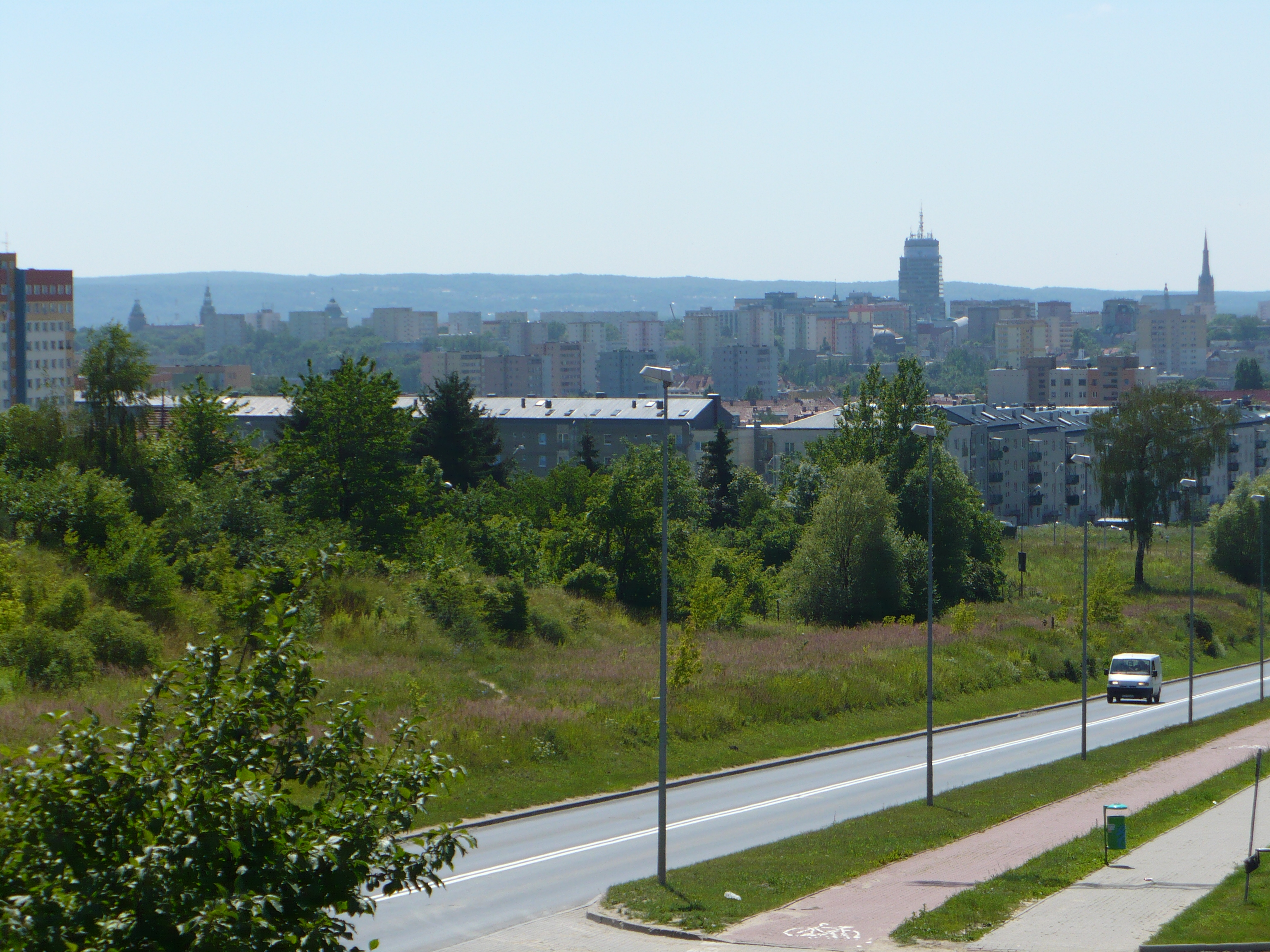 Szczecin-Warszewo - ul.Duńska / Krasińskiego (panorama miasta)